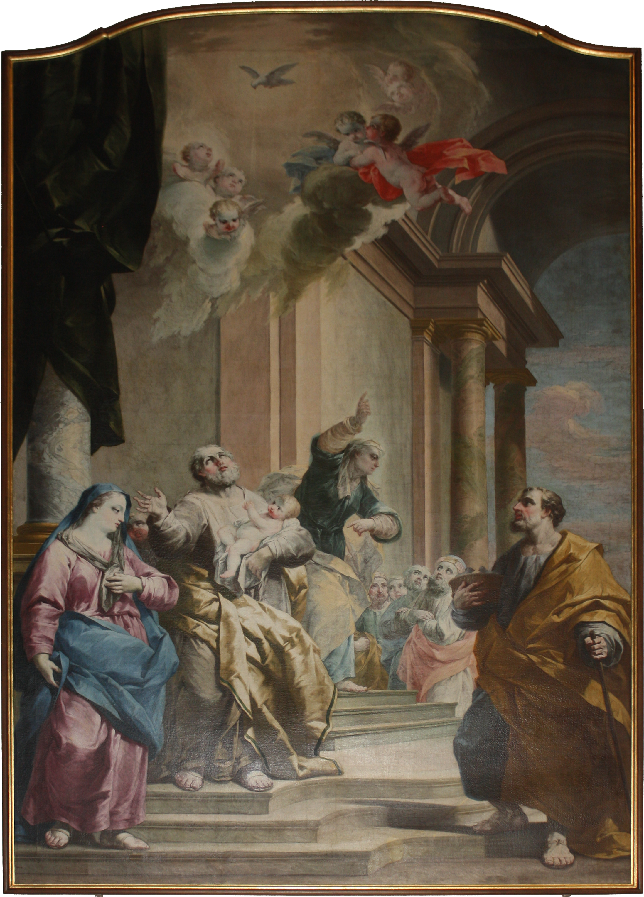 Dipinto olio su tela raffigurante la Presentazione di Gesù al Tempio, opera di Biagio Bellotti del 1765-1770 conservata presso la chiesa di San Martino di Carnago (VA), insieme all'opera Nascita di Maria.